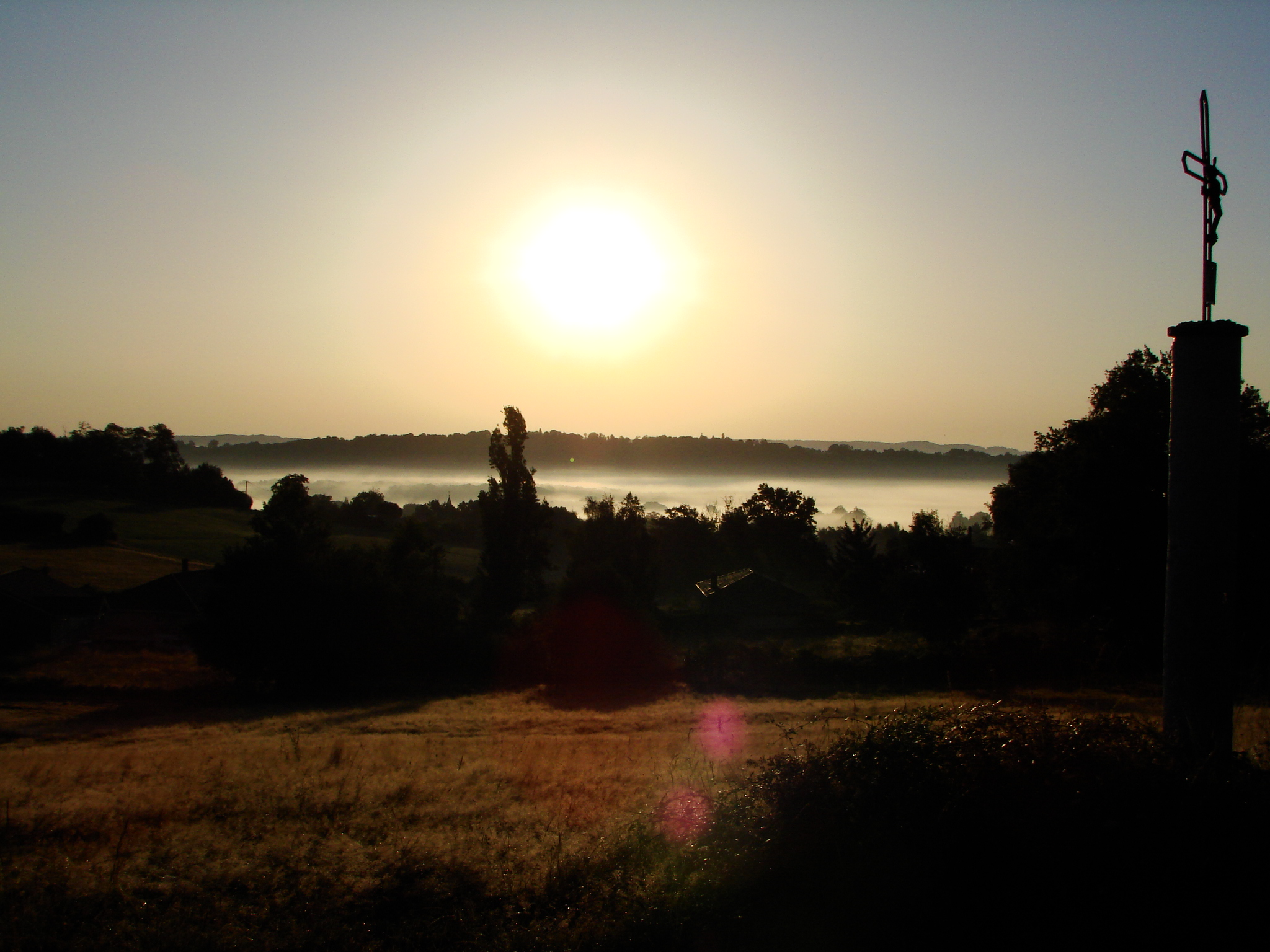 Vue du village de Louit dans les Hautes-Pyrénées (France) : Vue du village dans la brume matinale (vue prise depuis le sentier menant à Dours)